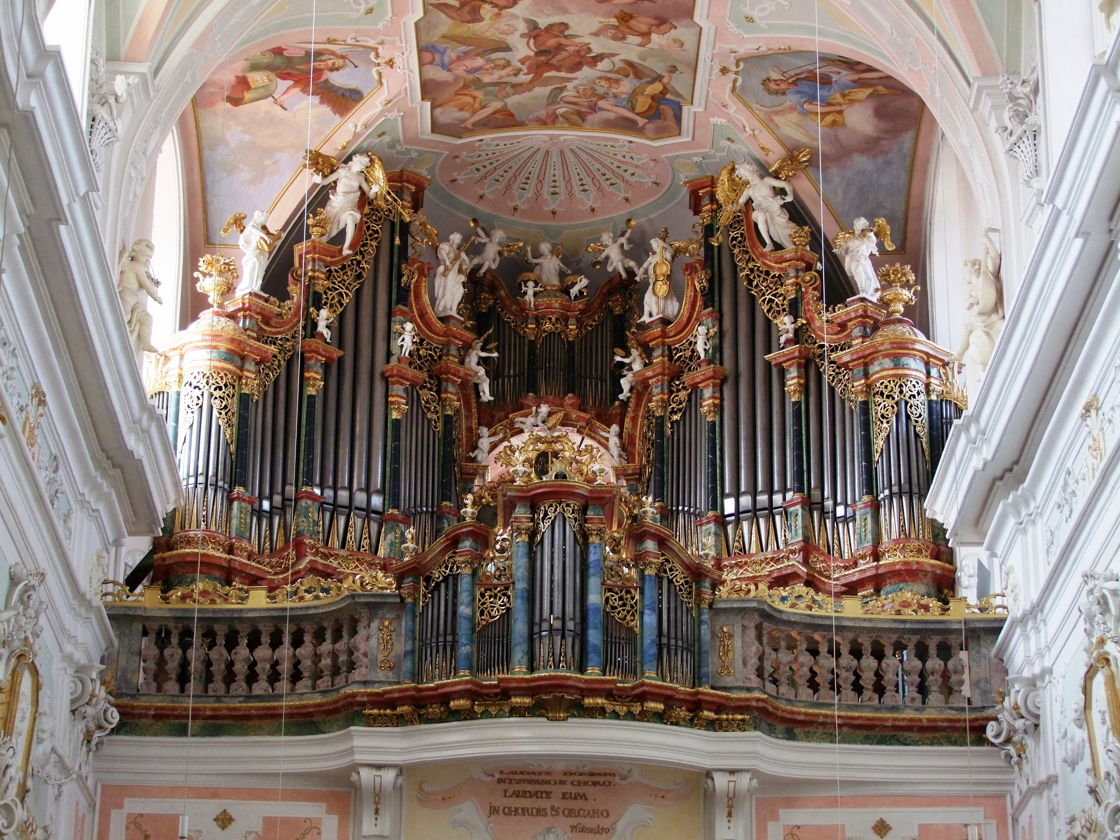 St. Georg, ehemalige Klosterkirche des oberschwäbischen Klosters Ochsenhausen